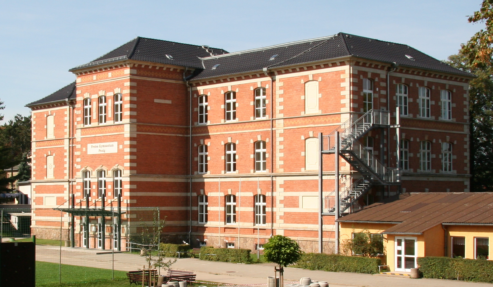 Schützenhausweg 4 in Penig, Gymnasium, rotes Gebäude